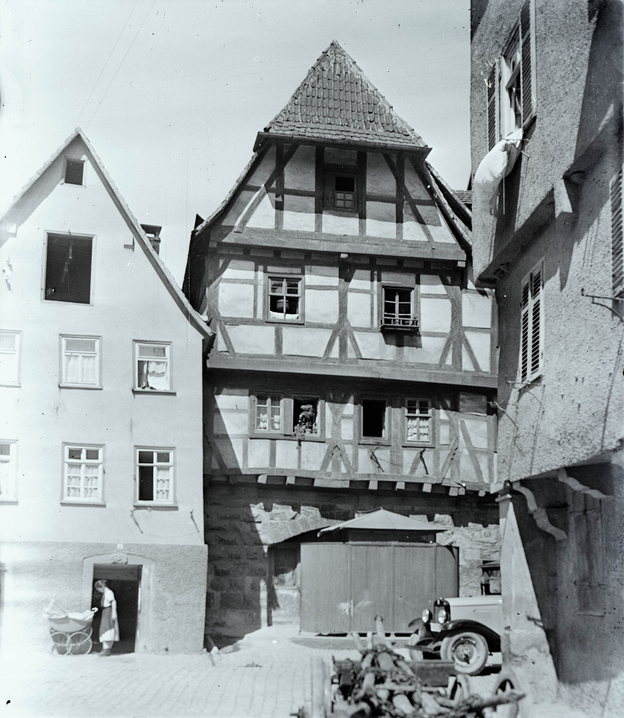 Das als Hohkrähe bekannte um 1400 erbaute, 1944 zerstörte Fachwerkhaus in der Fischergasse 47 in Heilbronn. Vor dem Tor im Erdgeschoss befindet sich ein öffentliches Pissoir.[1]